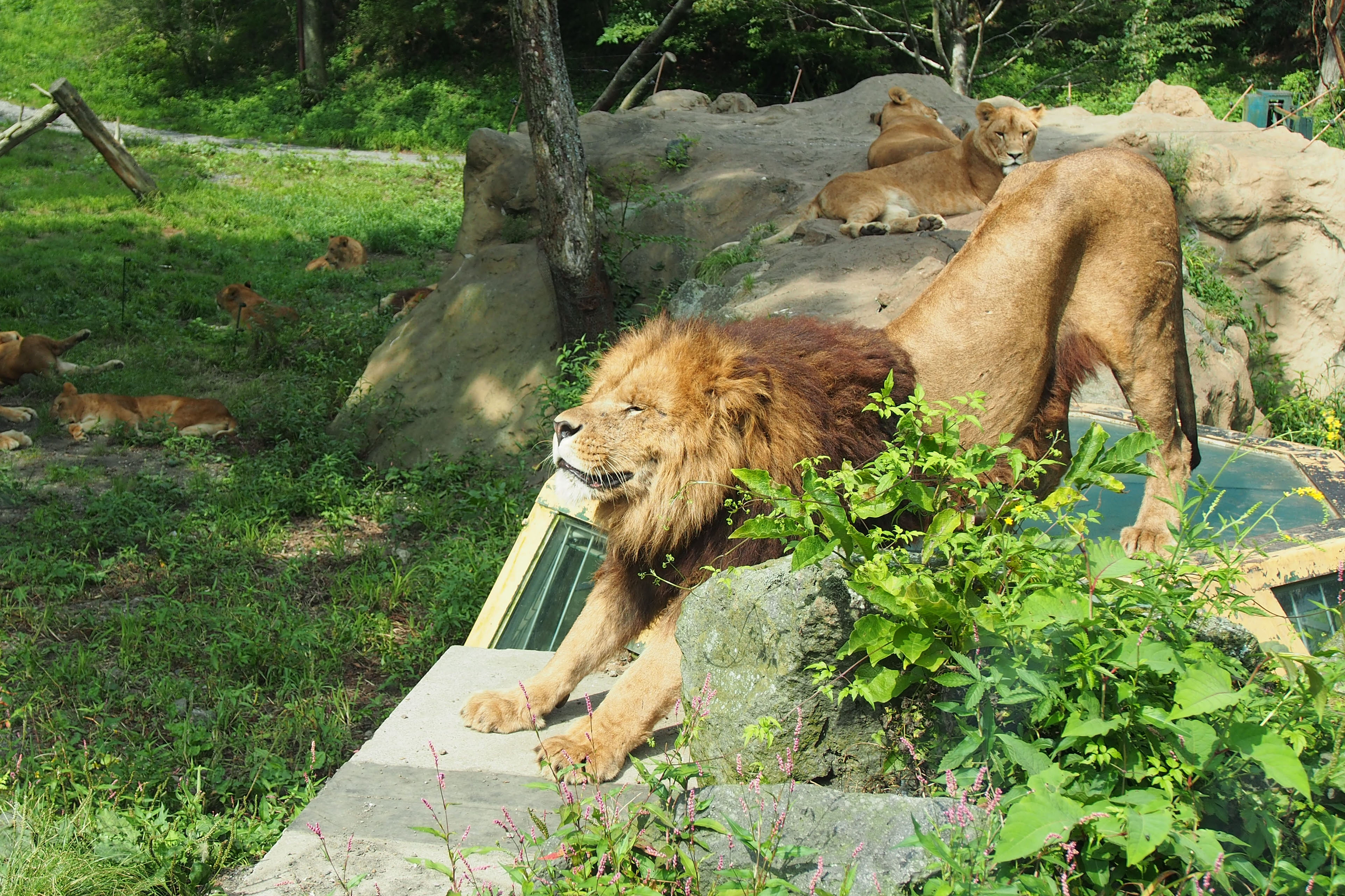 ライオンが伸びたところ。富士サファリパークにて。2013年2月以前。